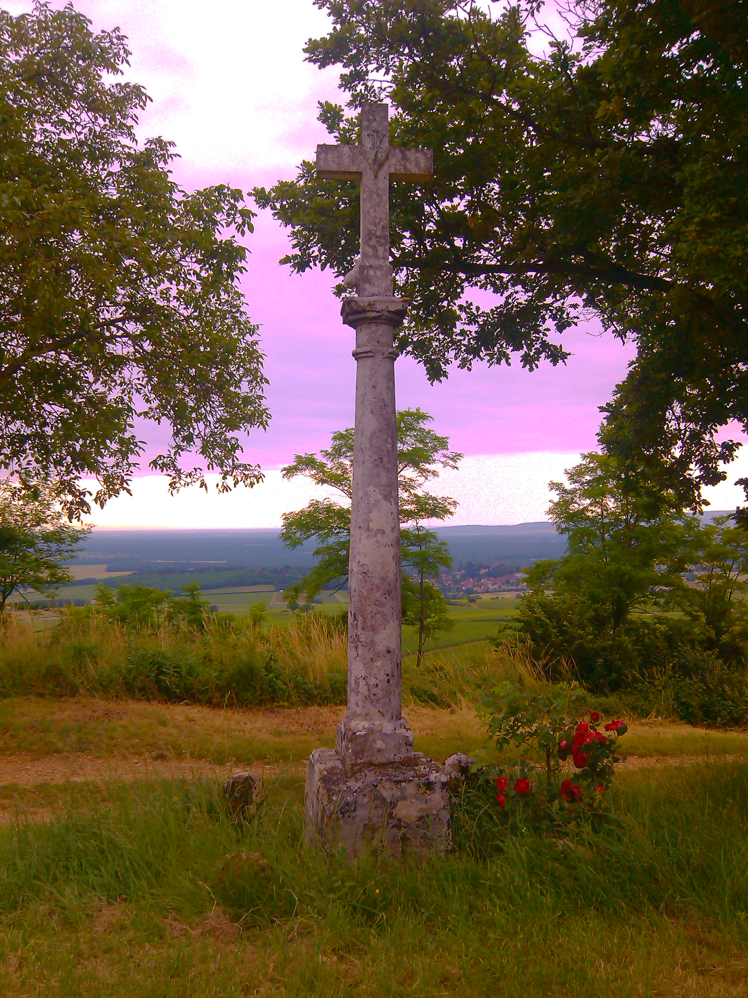 En haut du Hameau en direction de Montorge.